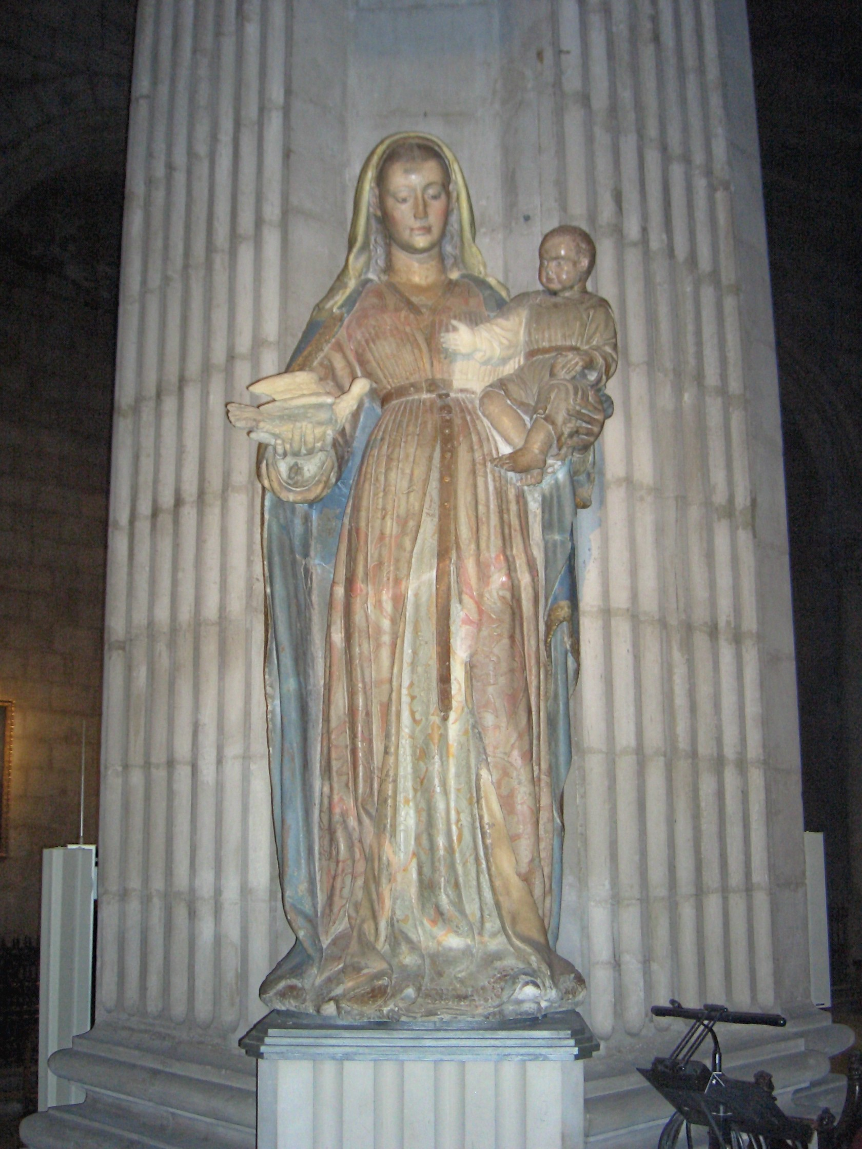 Imatge de la Verge del Blau realitzada la La Seu Nova de Lleida, es característic el blau que presenta al front que segons la tradició es deu al cop que li va donar el mestre escultor.